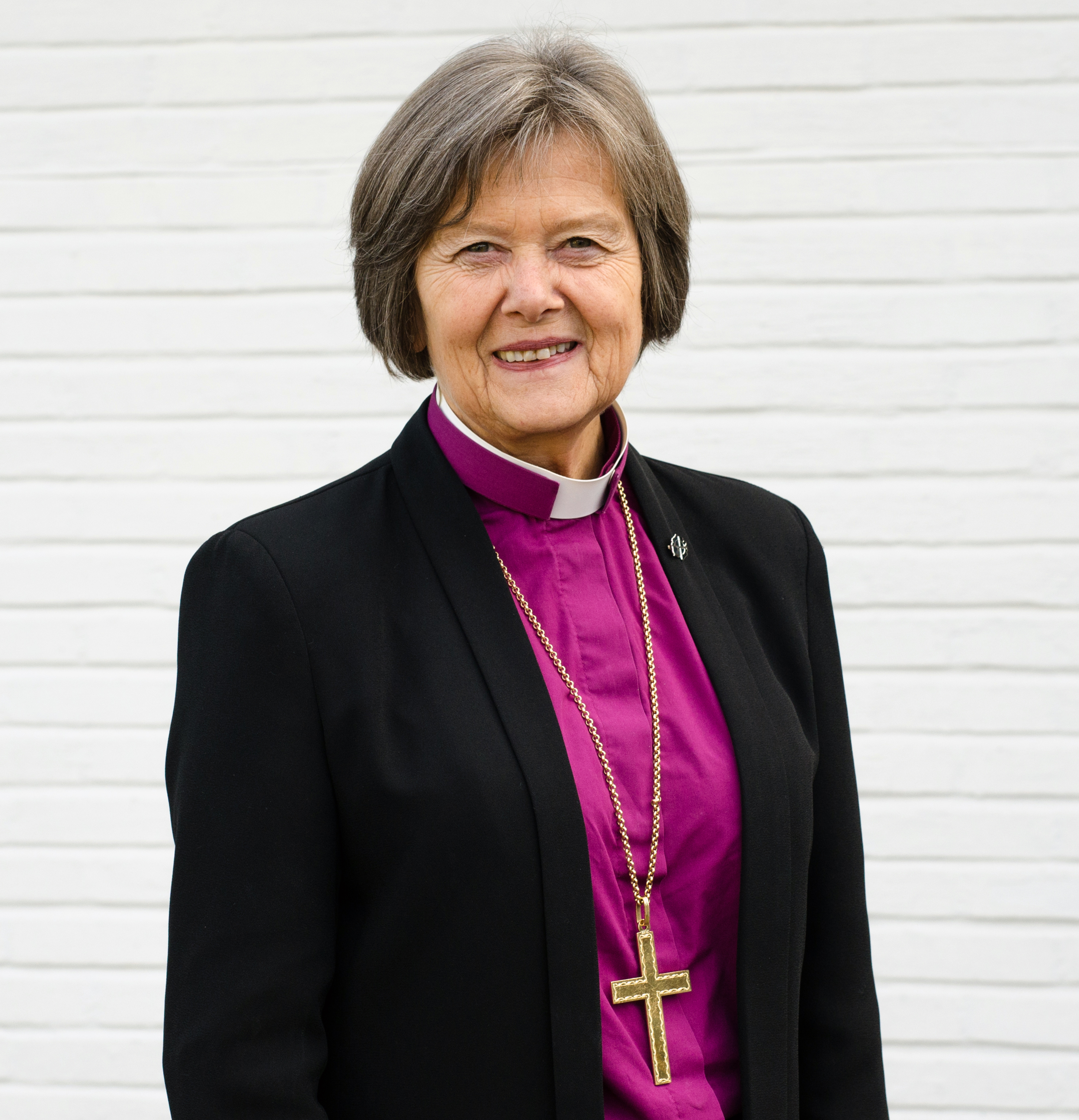 Helga Haugland Byfuglien, preses Den norske kirke